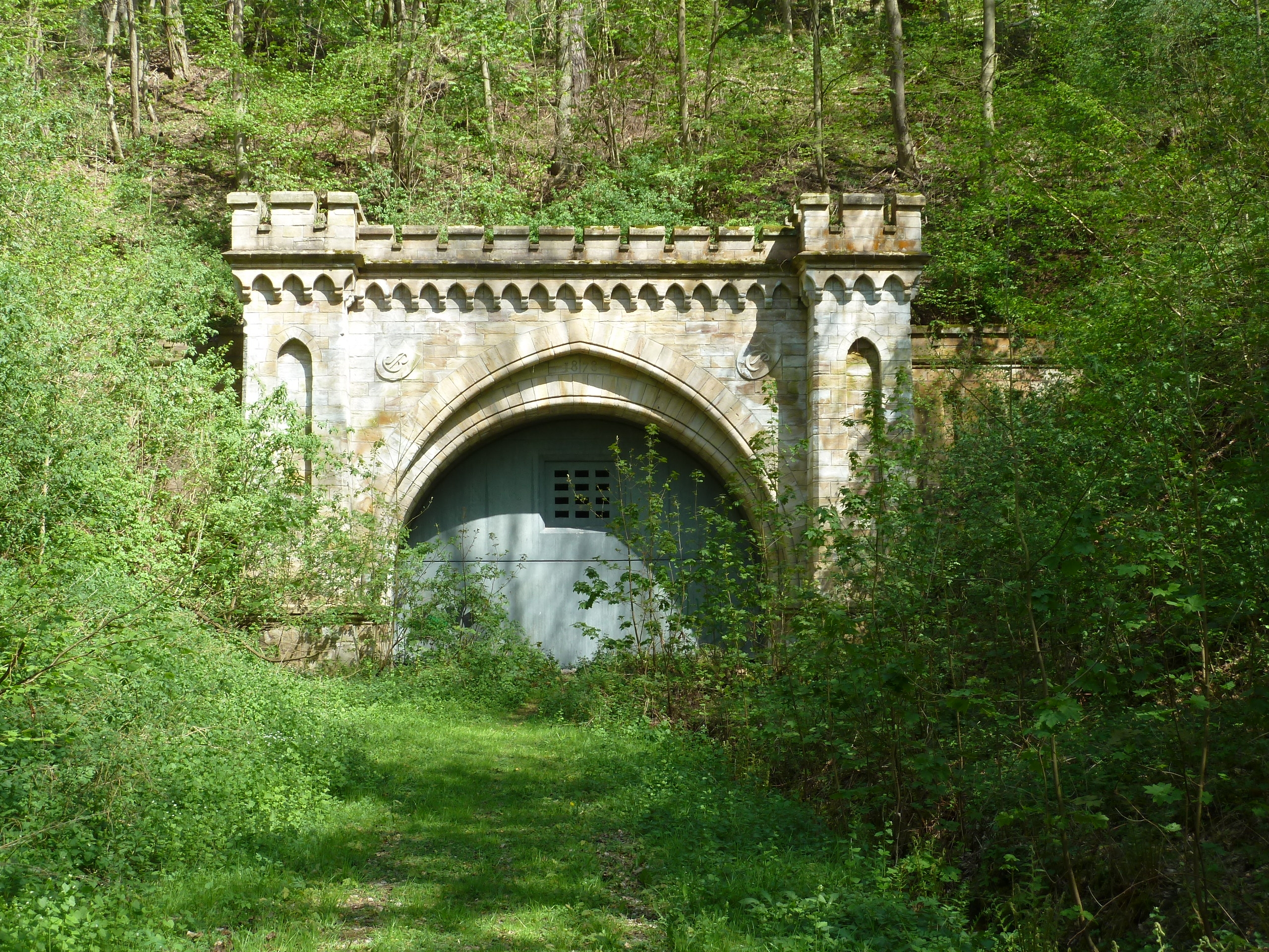 Westportal des Friedatunnels der Kanonenbahn bei Schwebda, Gemeinde Meinhard